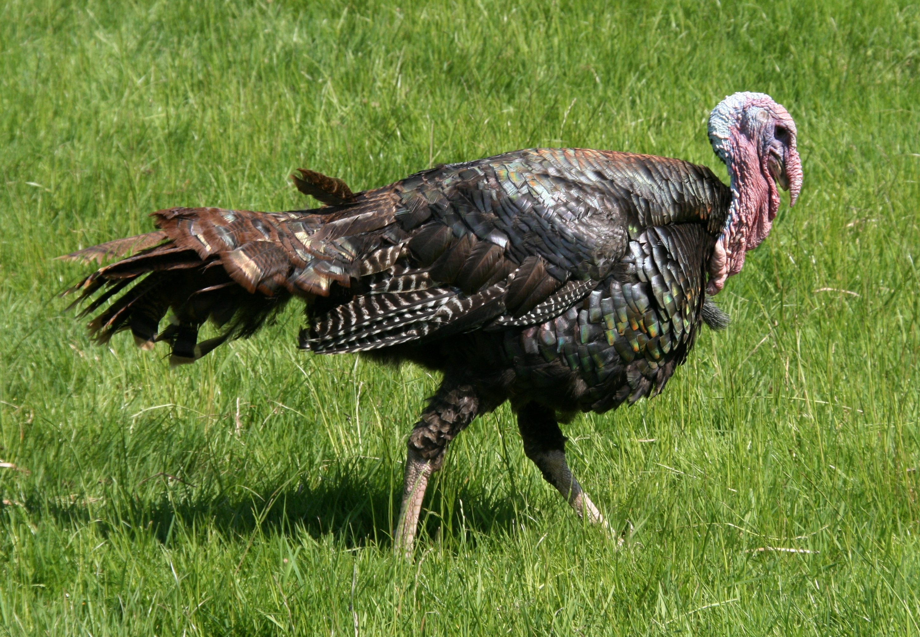 Die Truthühner (Meleagris) hier die Bronzepute sind eine Gattung der Fasanenartigen und gehören zu den Hühnervögeln. Sie bilden allein die gleichnamige Unterfamilie (Meleagridinae).